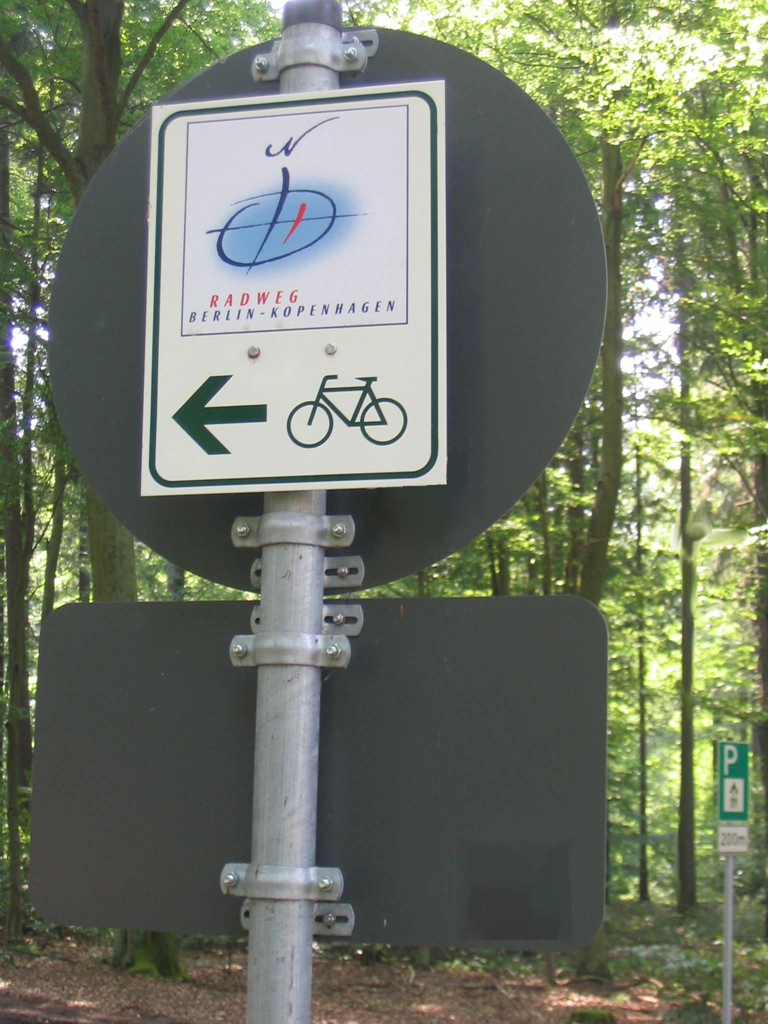 Wegweiser am Radfernweg Berlin-Kopenhagen, wie er in Brandenburg Verwendung findet